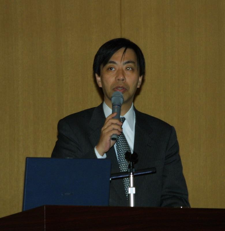 さいたま新都心合同庁舎1号館講堂で開かれた平成18年度関東バイオマスシンポジウムで講演する末松広行